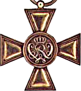 Goldenes Militaer Verdienstkreuz; 2009-04-05